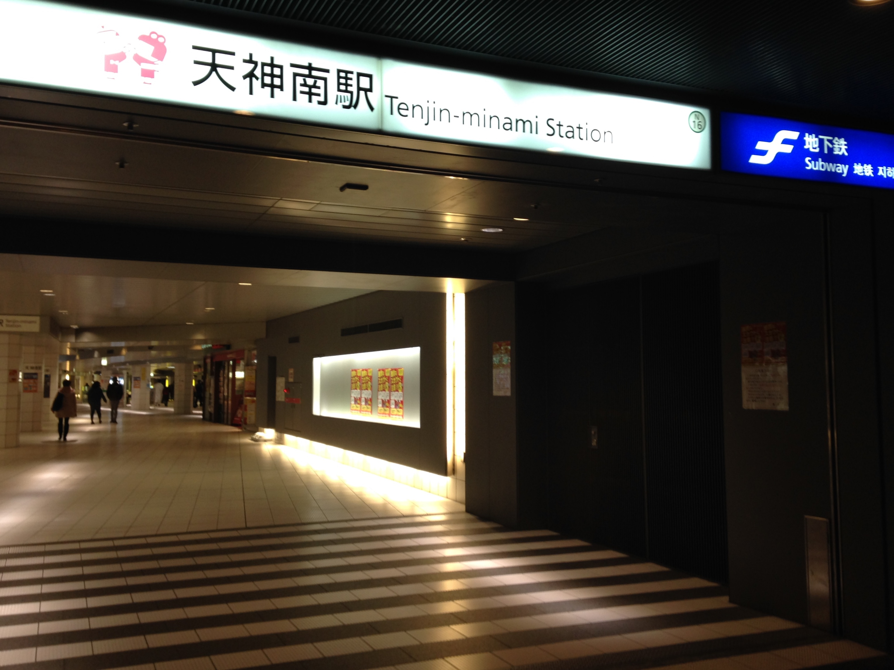 天神南駅の入り口